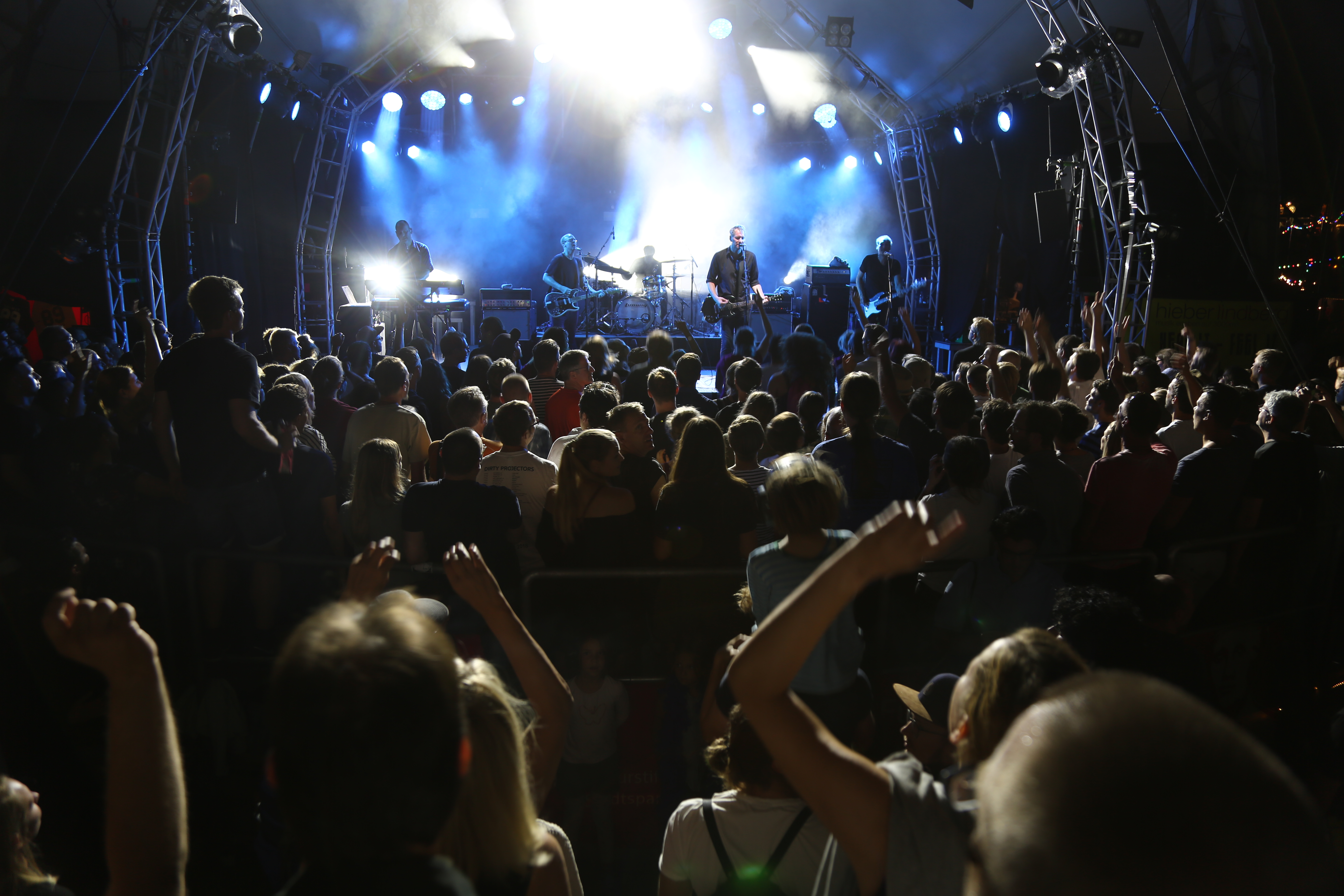 Kettcar am 17. August 2018 im Münchner Theatron